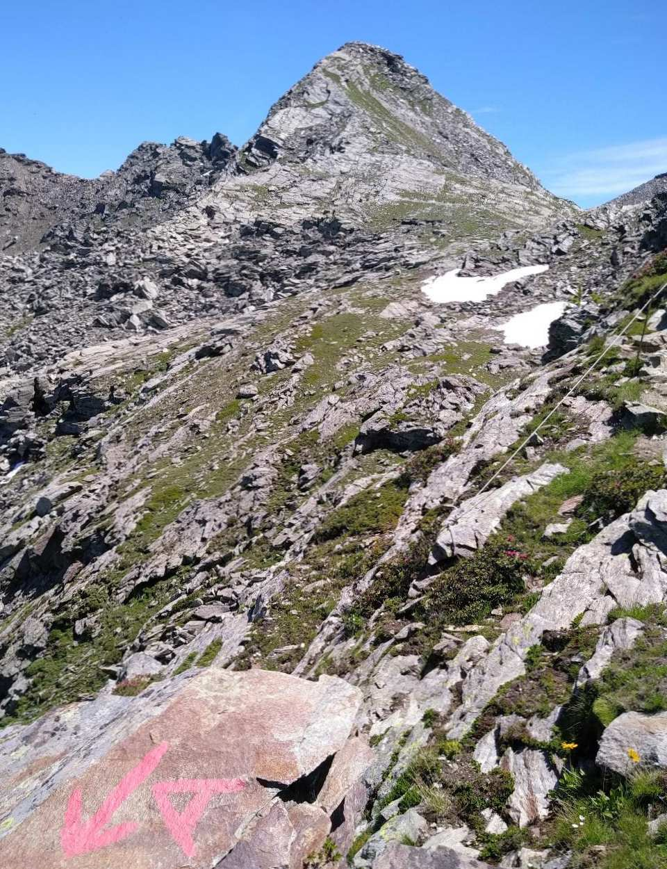 La Punta Founset (Alpi Cozie): il versante affacciato sulla Valle Germanasca